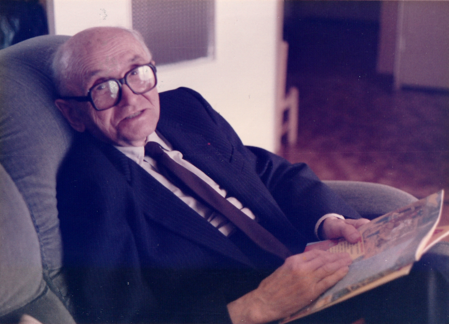 Jean Malo-Renault (1900-1988), ex-conserrvateur des bibliohèques universitaire et municipale de Rennes. Chevalier de la Légion d'Honneur (1953)